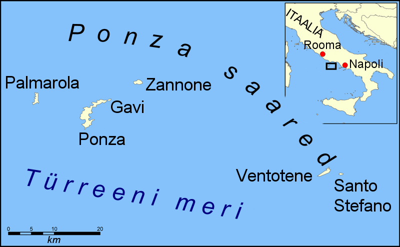 Ponza saarte kaart